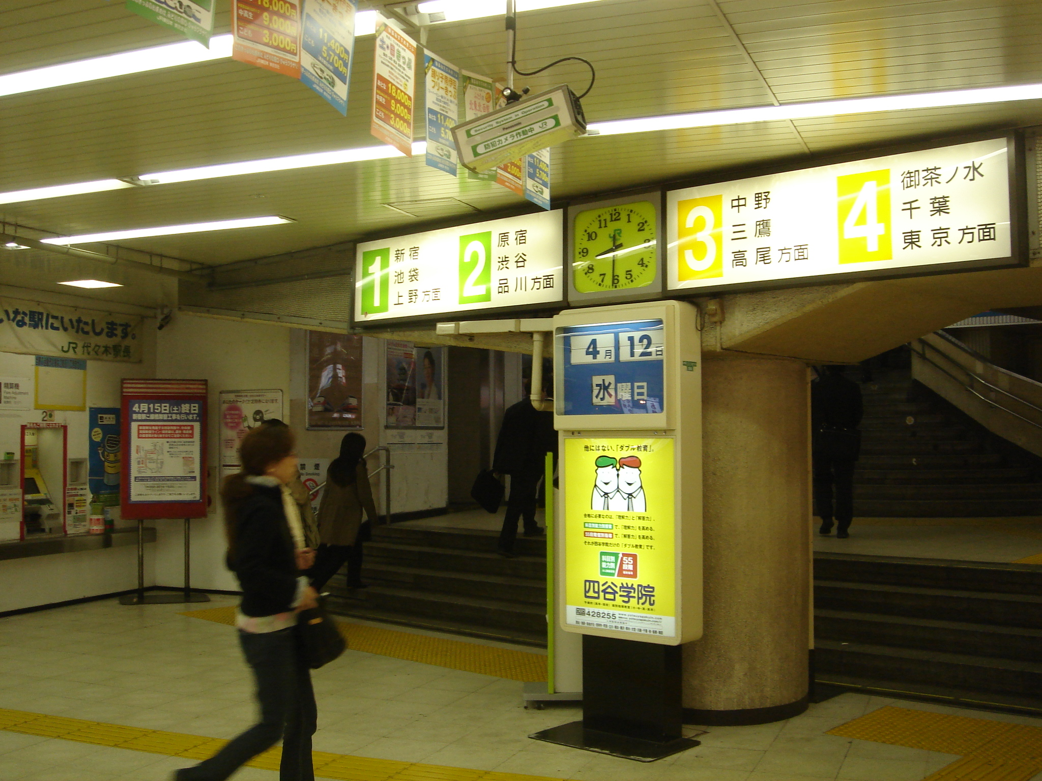 note